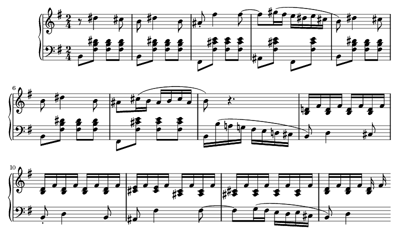 Inicio del segundo tema del primer movimiento de la sonata para piano Op. 31 nº 1 de Beethoven